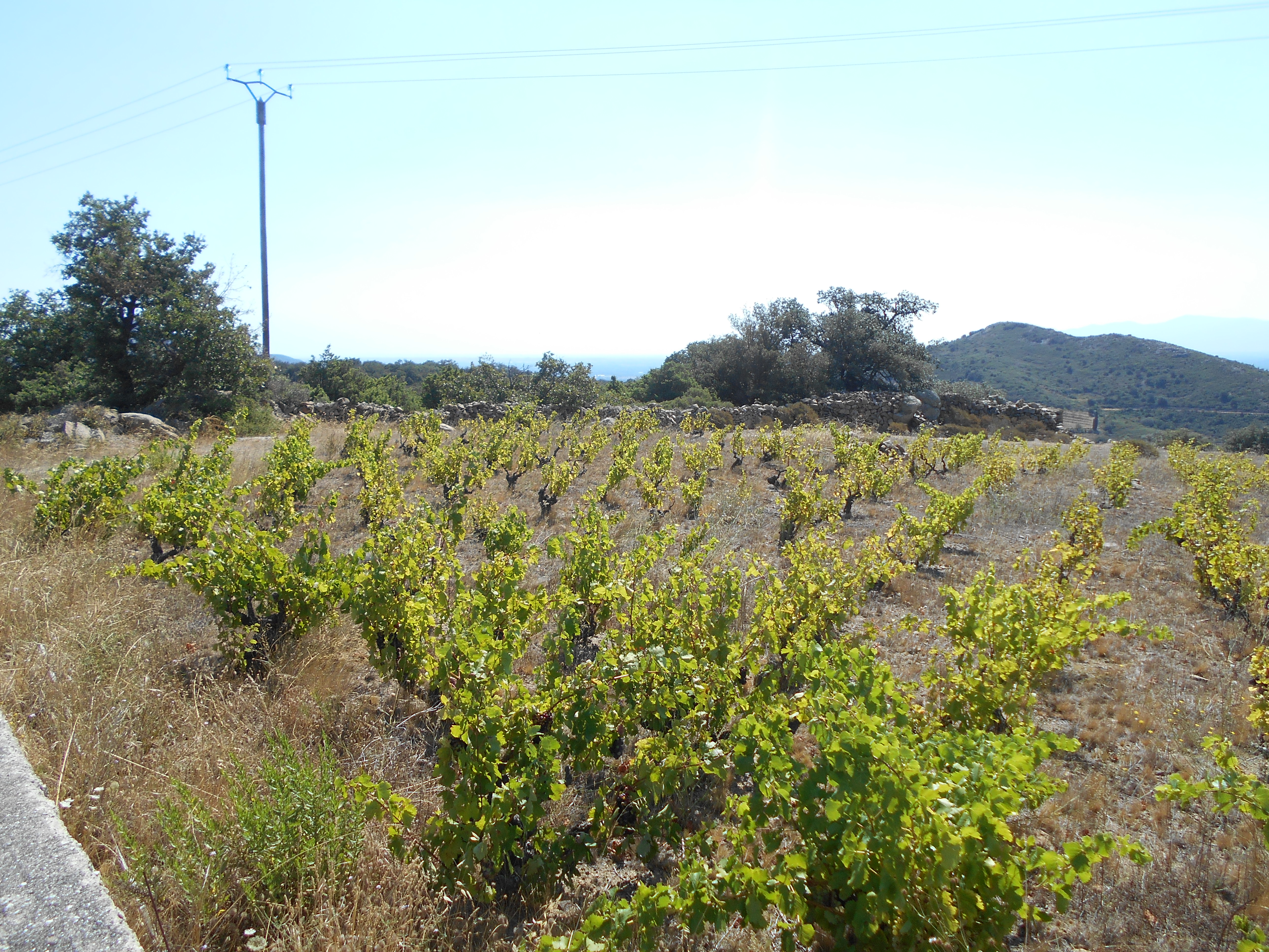 Lloc de l'antic poble de Llebrers